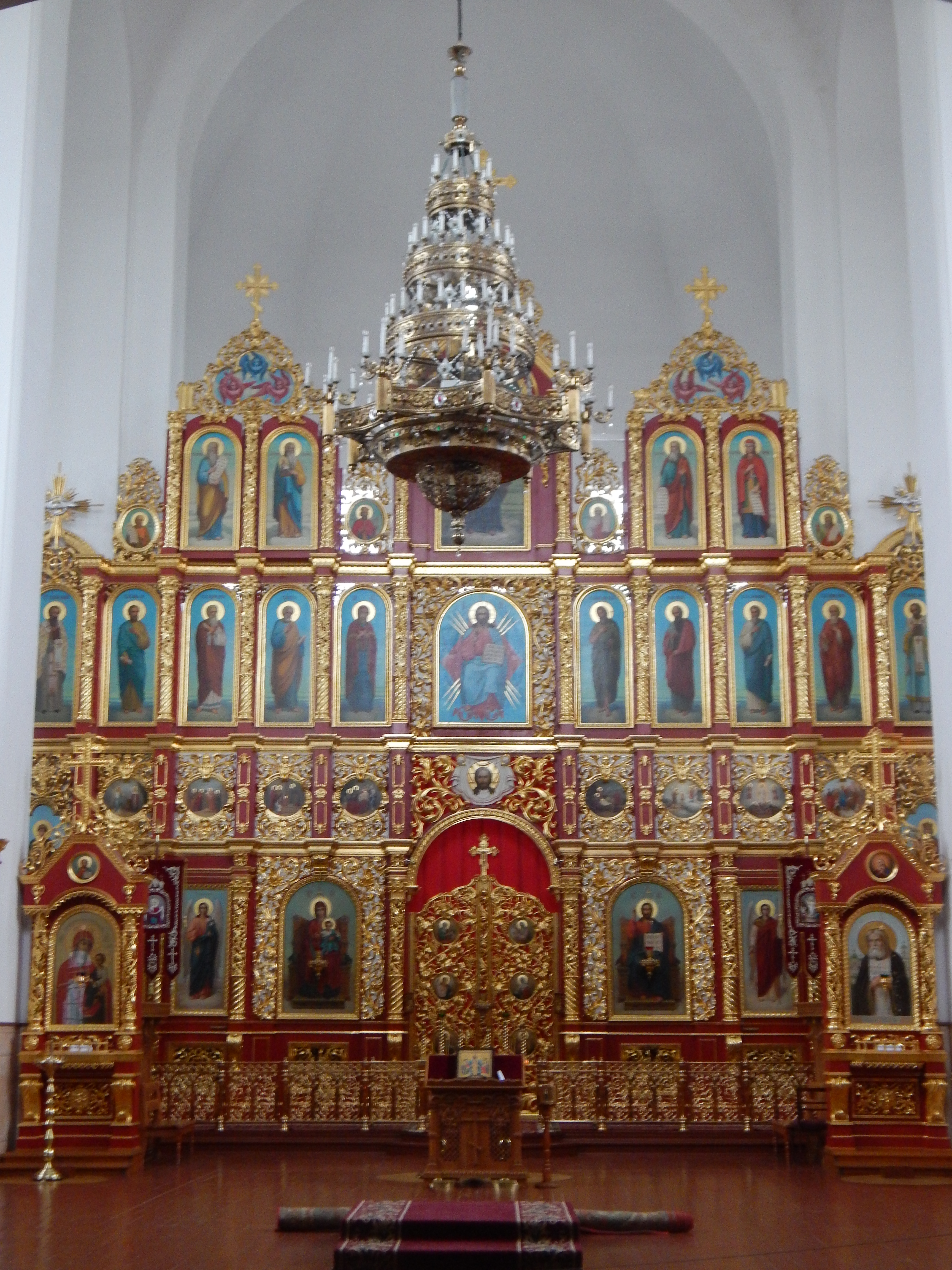 Феофанія, Голосіївський район Saint Pantaleon Cathedral